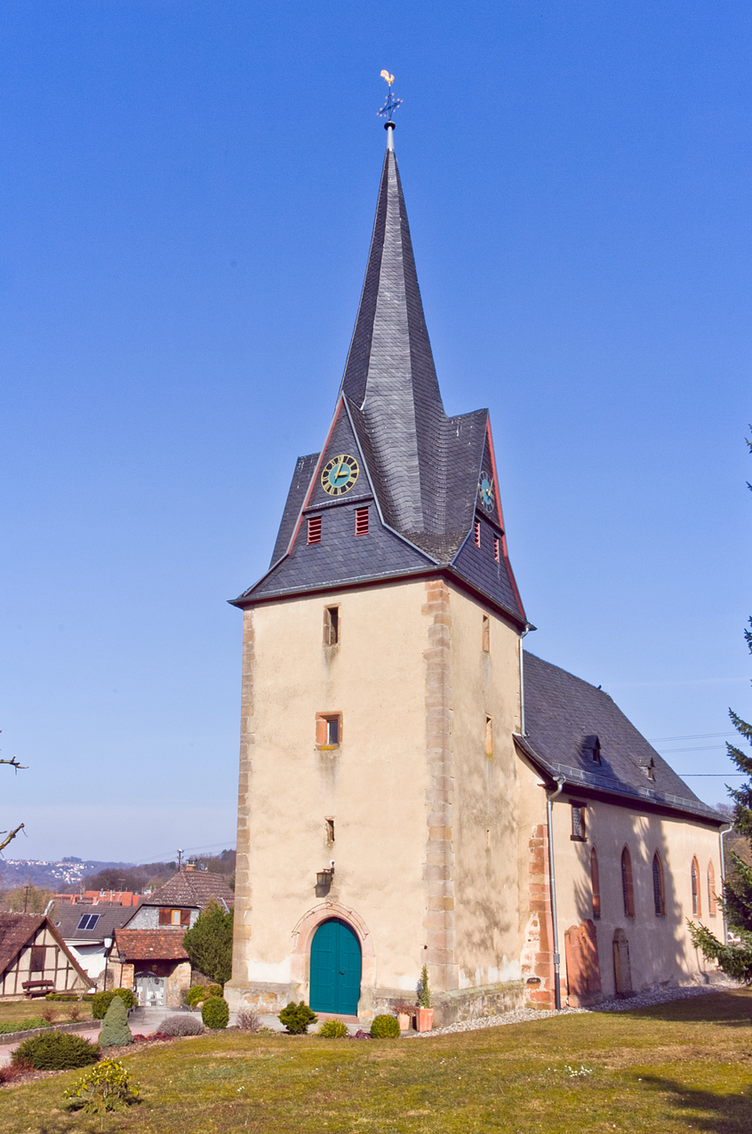 Kirche in Selters (Ortenberg) im Wetteraukreis in Deutschland